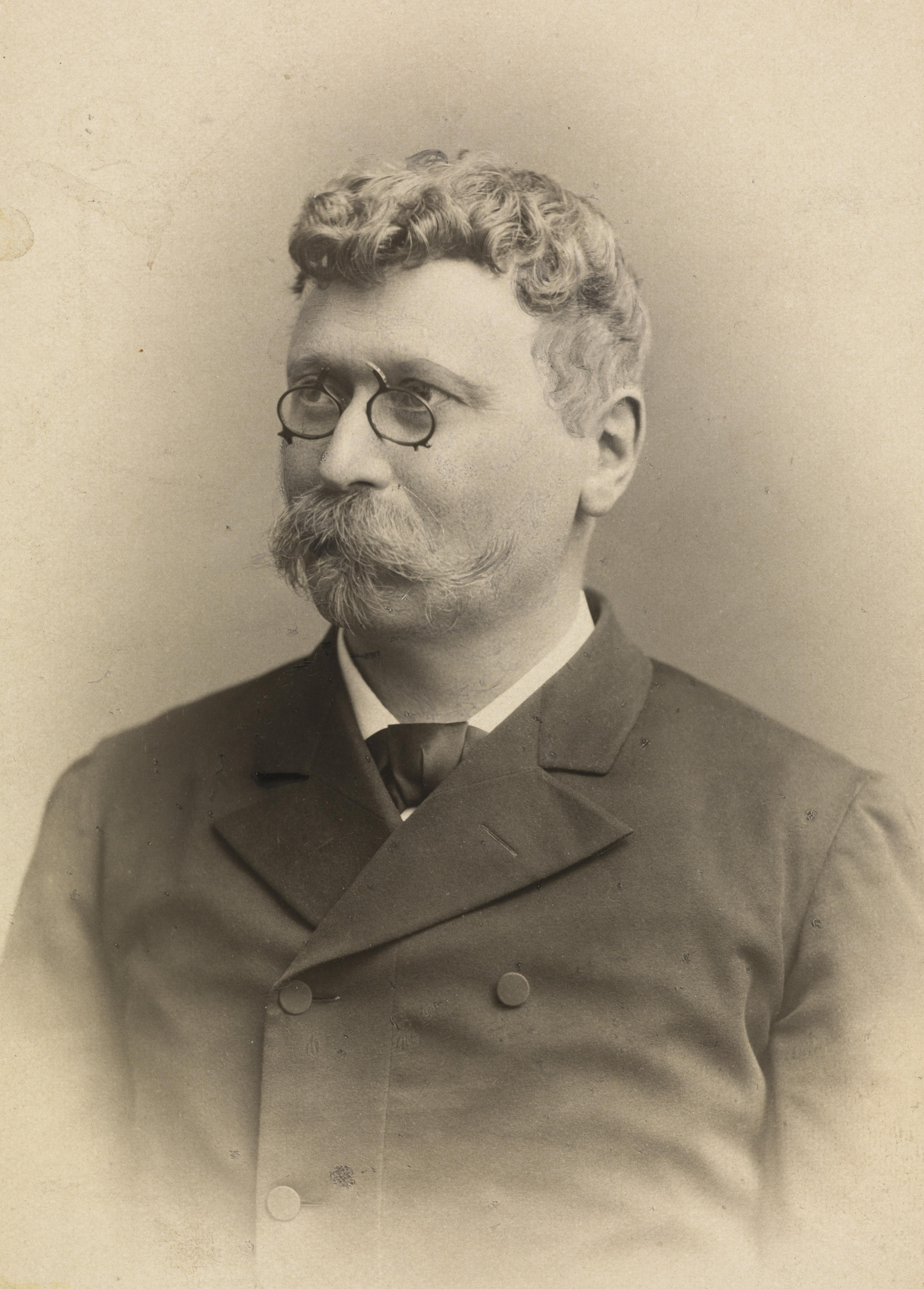 Bildet er hentet fra Nasjonalbibliotekets bildesamling Depicted person: Skougaard, Lorentz Severin